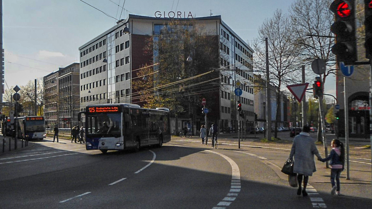 Diskothek Gloria Saarbrücken